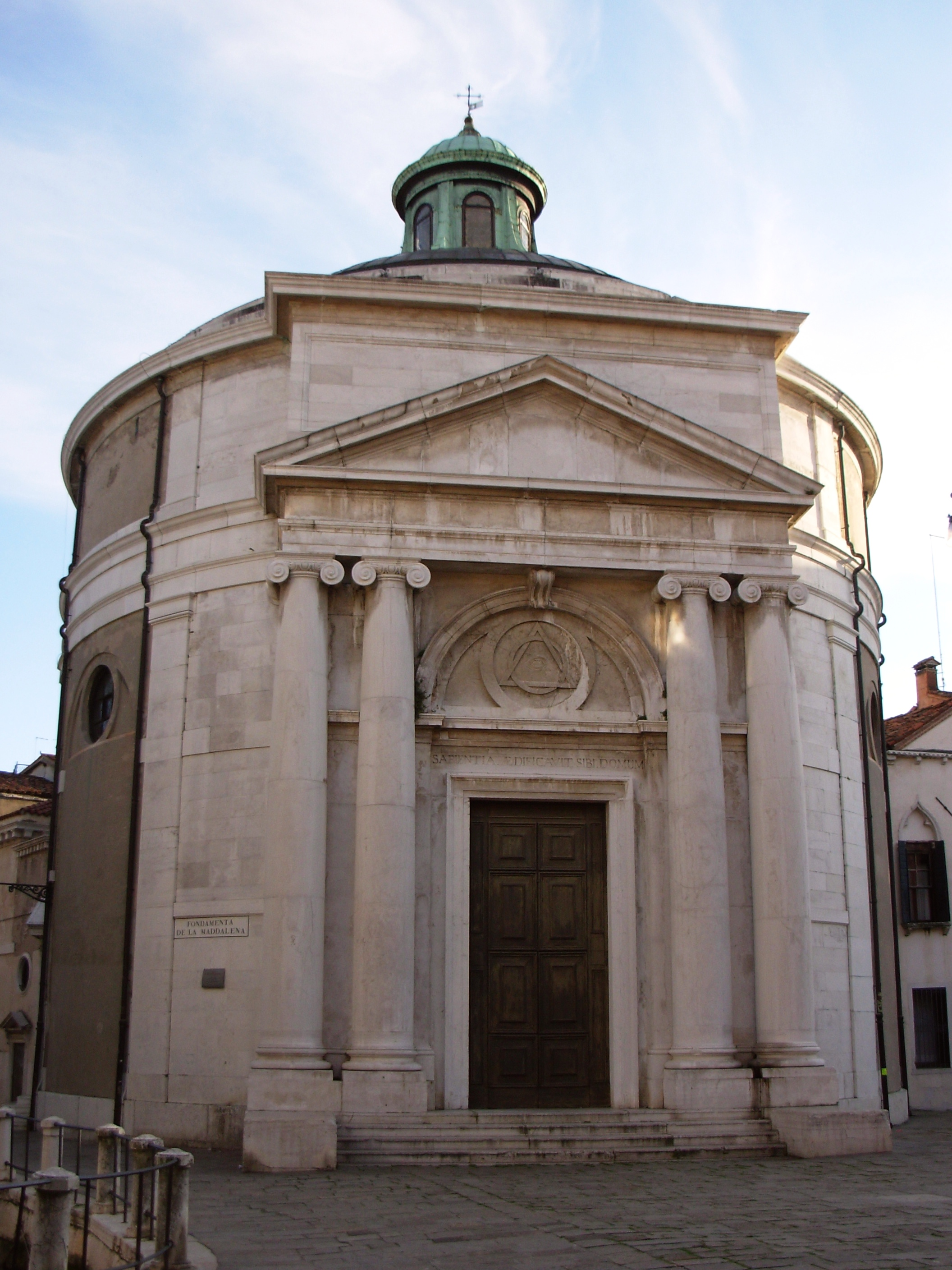 Venezia - Chiesa della Maddalena